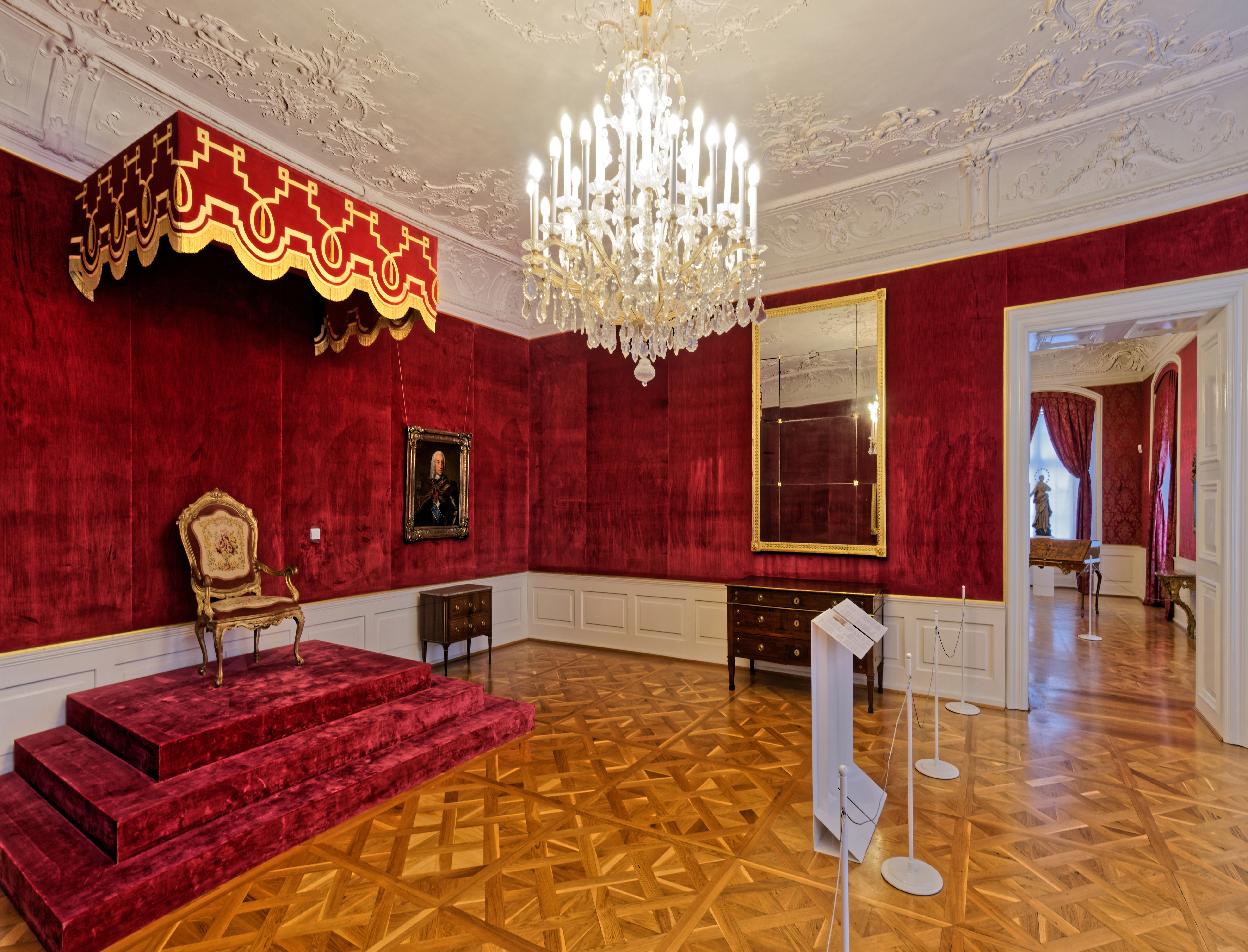 Neue Fürstenwohnung im Deutschordensschloss Bad Mergentheim.